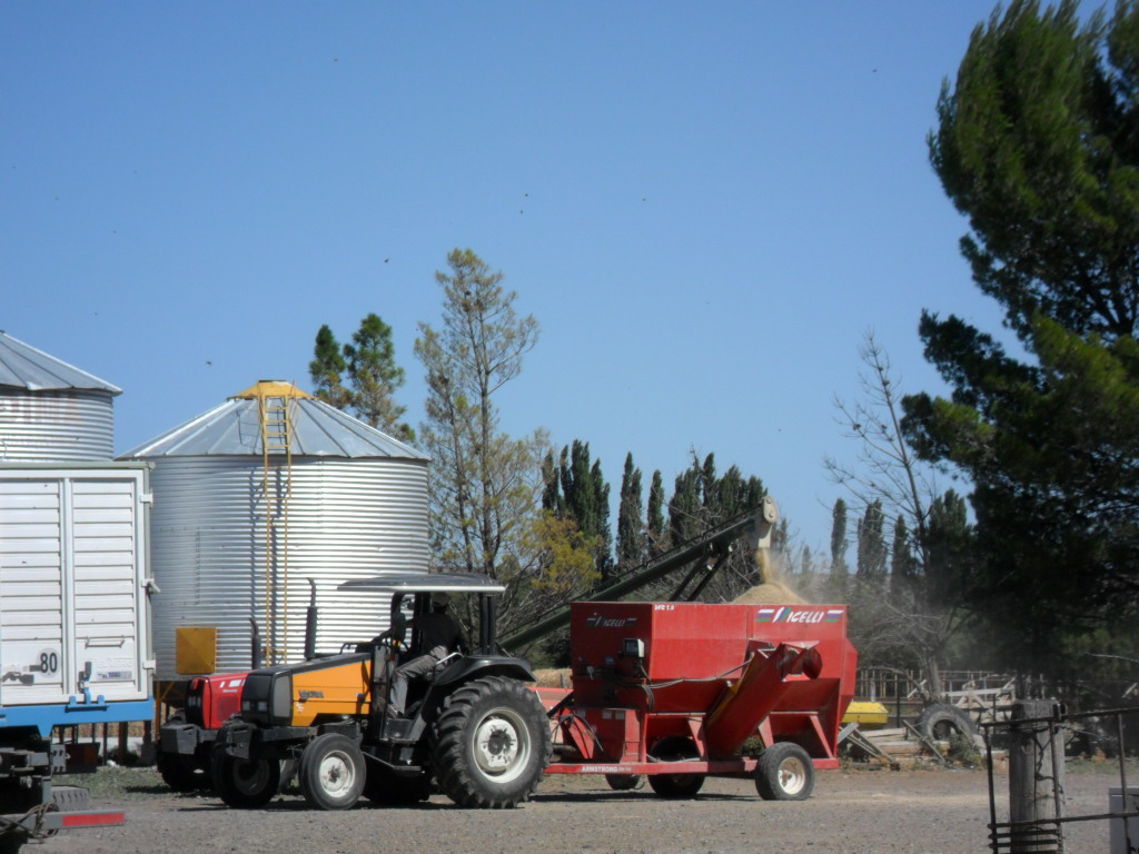 Tractor recolectando cereales de los siloes, en una chacra del valle